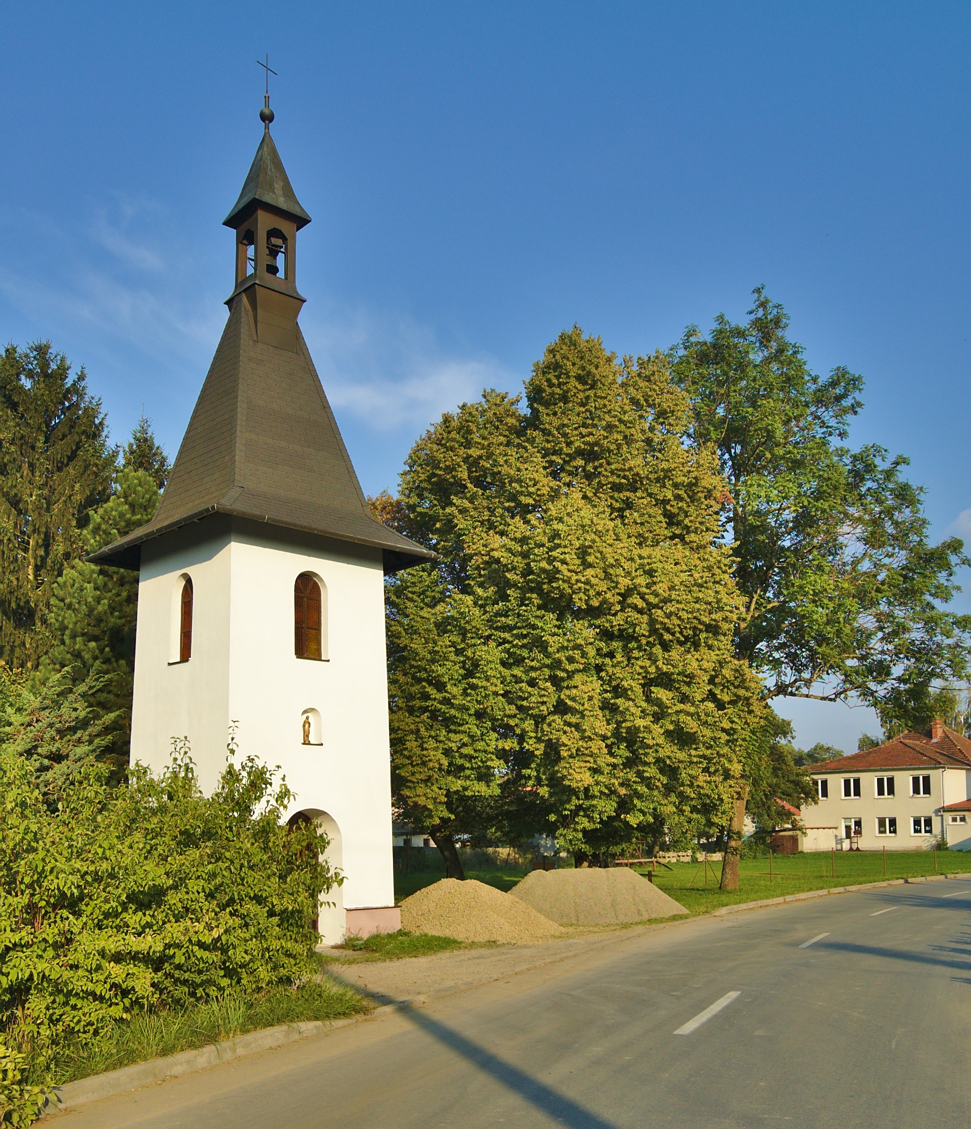 Zvonice, Niva, okres Prostějov